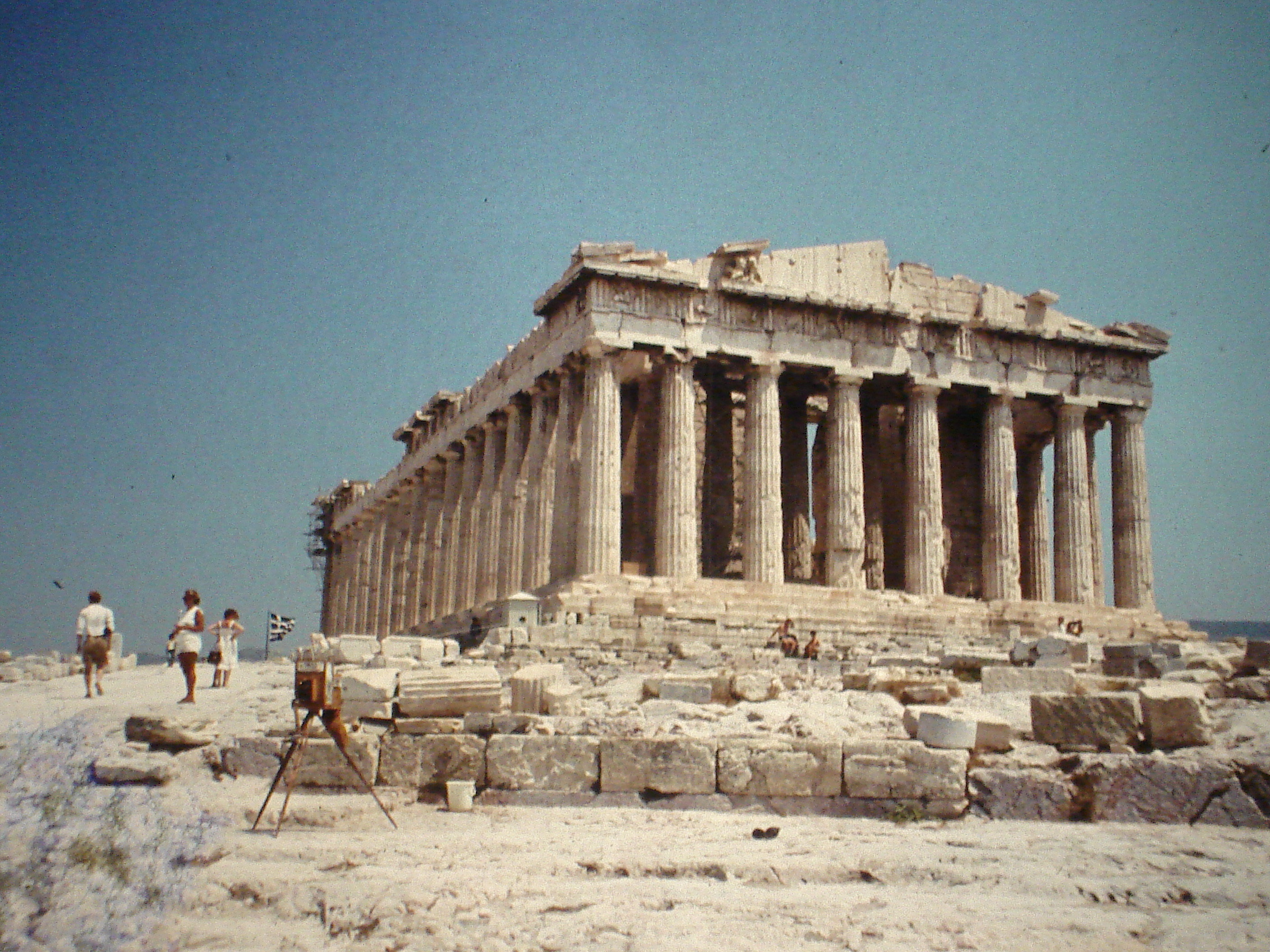 ACROPOLIS 1969